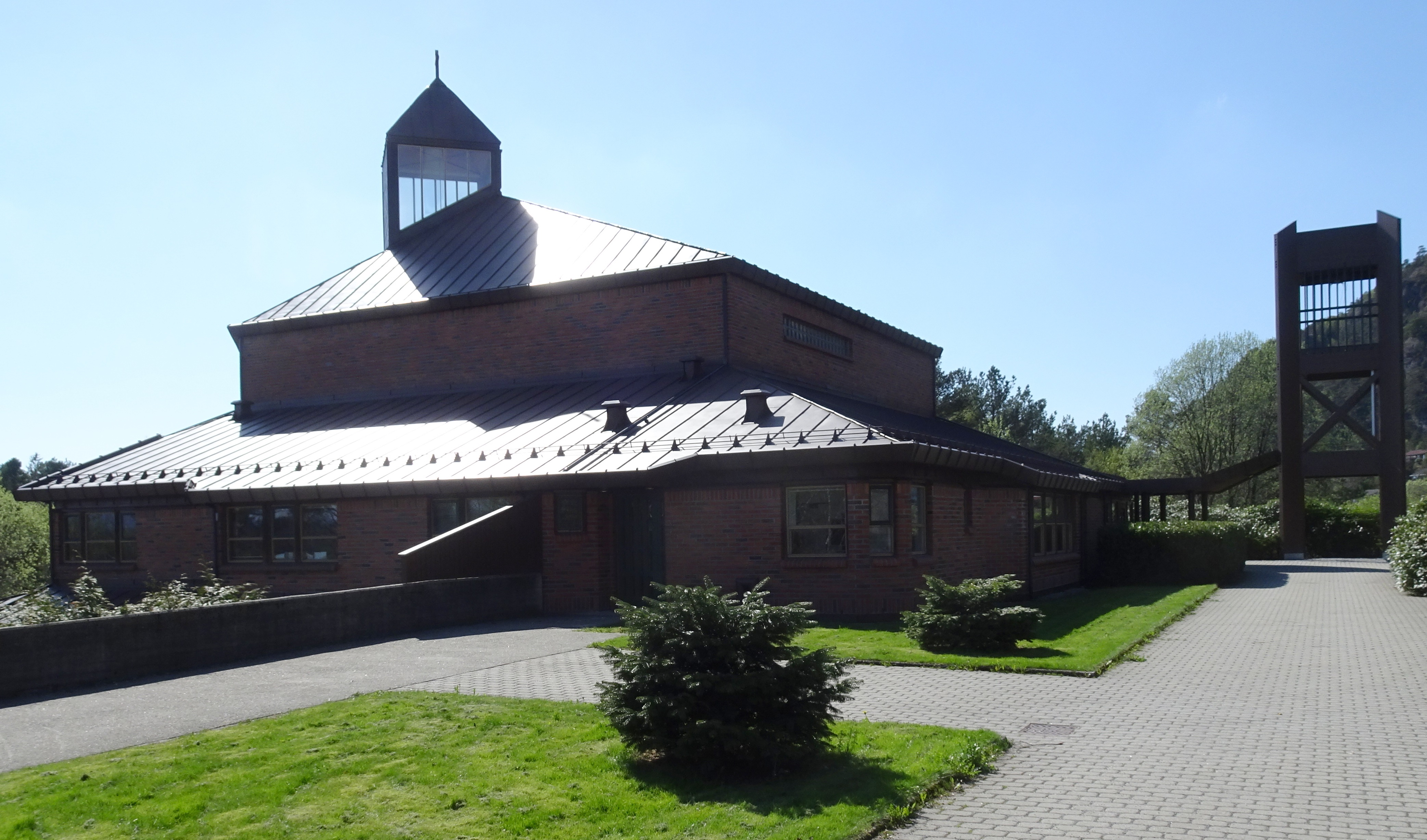 Nysæter kirke